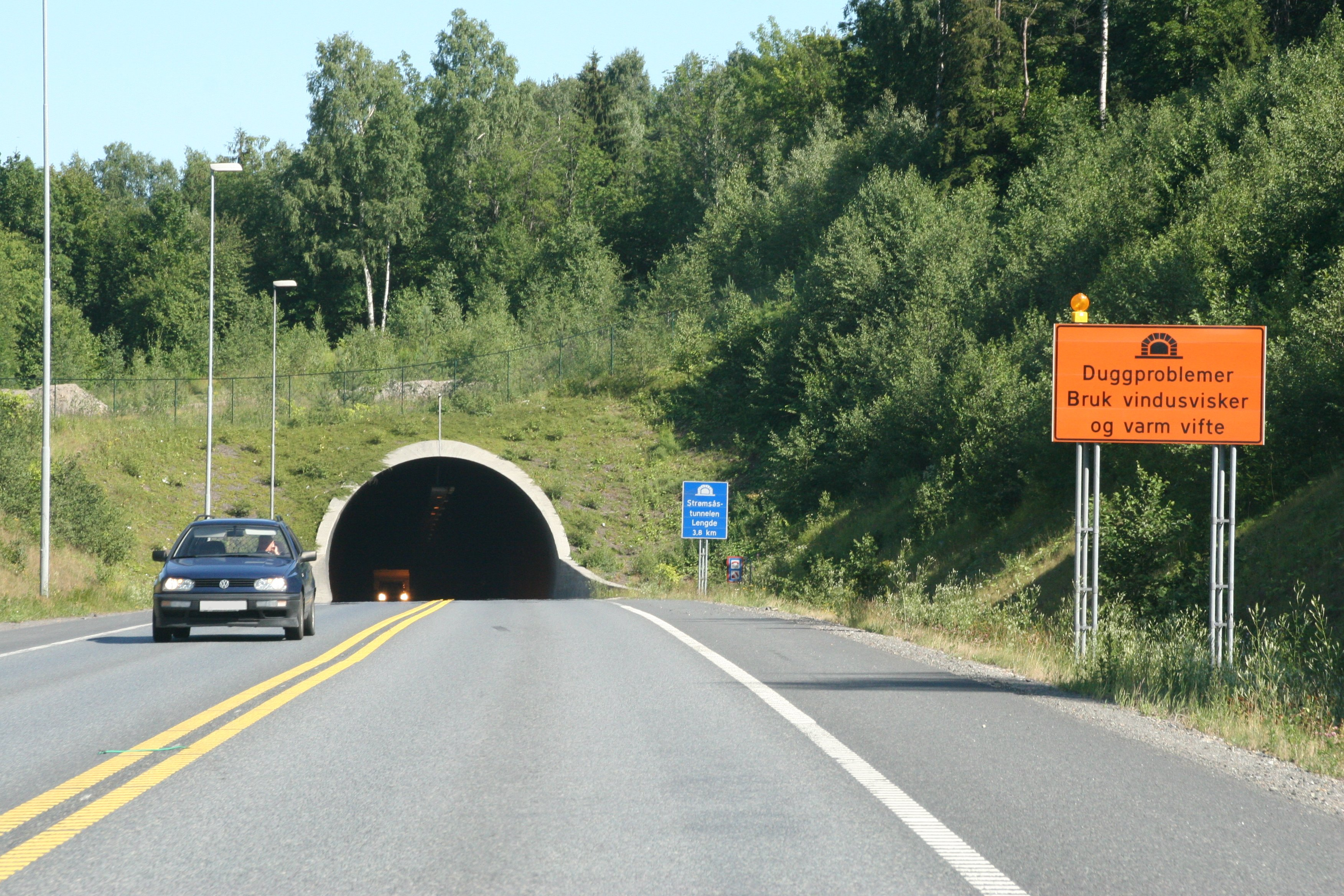 Strømsåstunnelen in Drammen, Norway